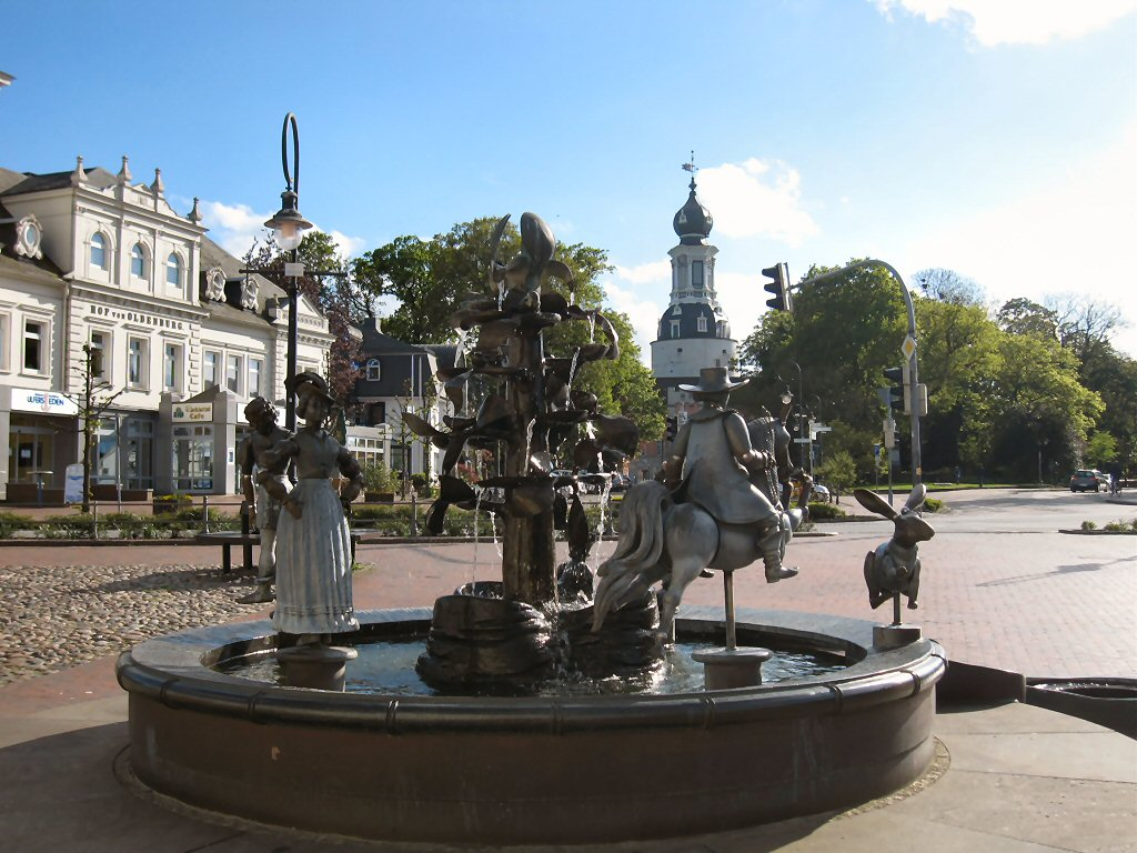 Der Sagenbrunnen in Jever; Künstler: Bonifatius Stirnberg